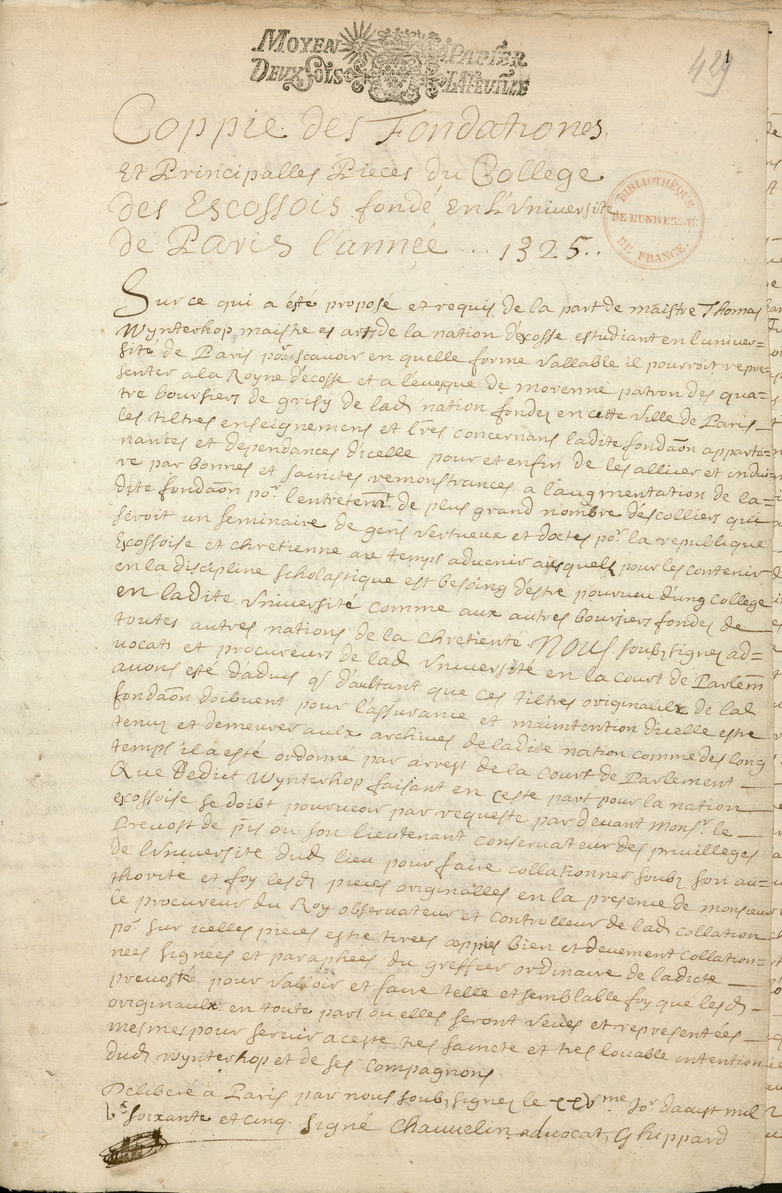 Manuscrit en latin, dans un registre de 738 feuillets consacré aux fondations et statuts des collèges.